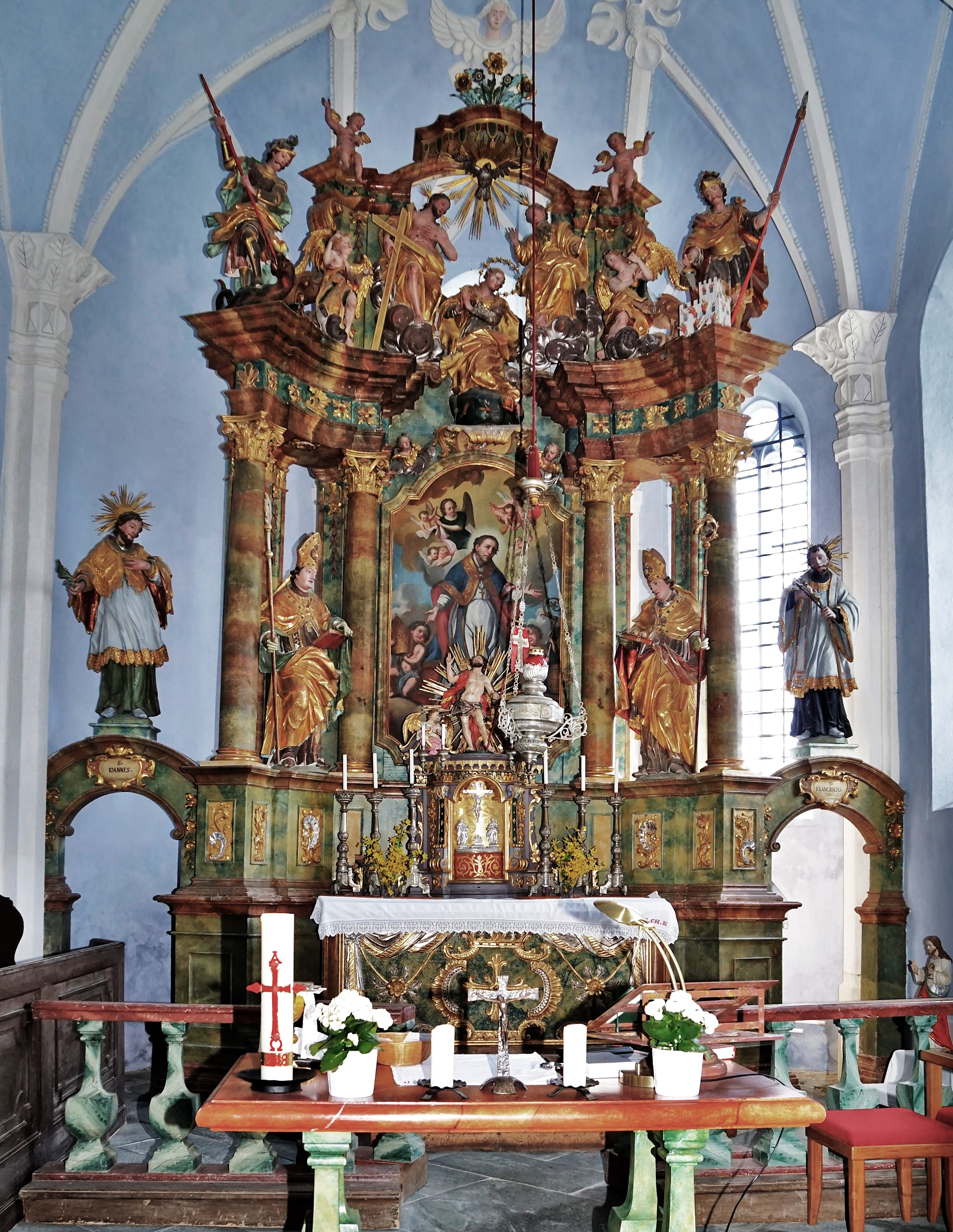 Kath. Pfarrkirche Hll. Rupert und Virgil Außerteuchen(Himmelberg), der barocke Hochaltar